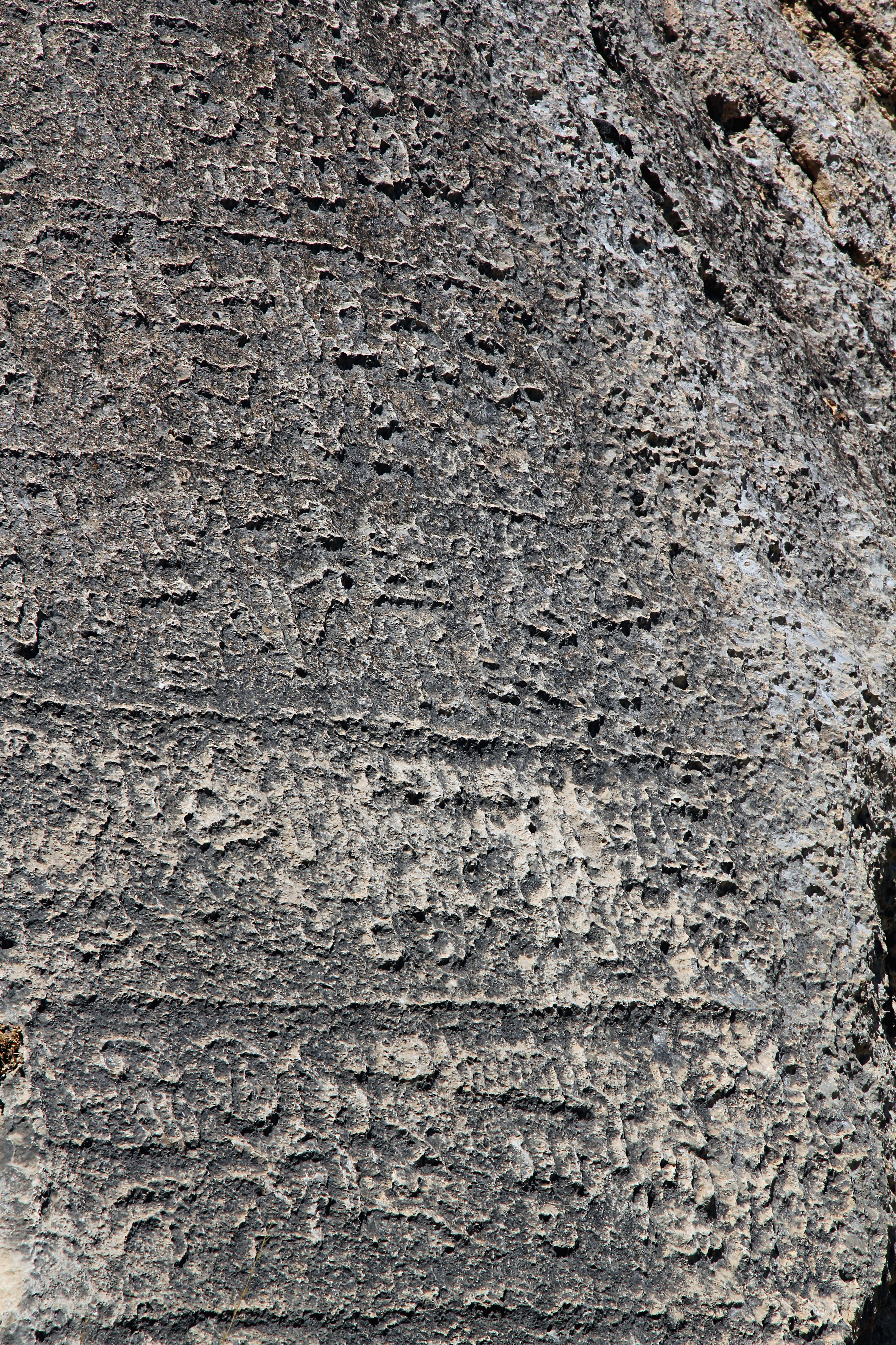 Luwische Felsinschriften von Gürün, Zentraltürkei, Obere Inschrift "Gürün B", Ausschnitt